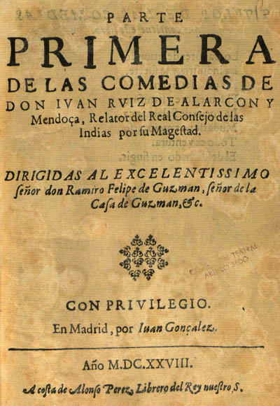 Parte primera de las comedias de don Juan Ruiz de Alarcón. Madrid: Juan González, 1628.